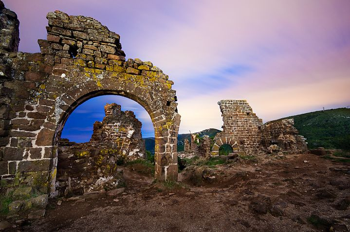 Restes del castell d'Eramprunyà (Gavà)